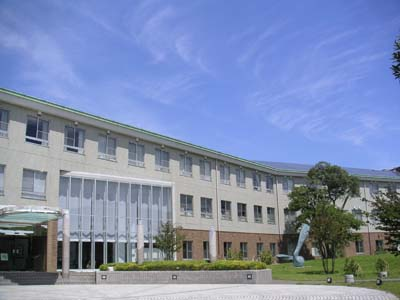 総合研究大学院大学葉山キャンパス。